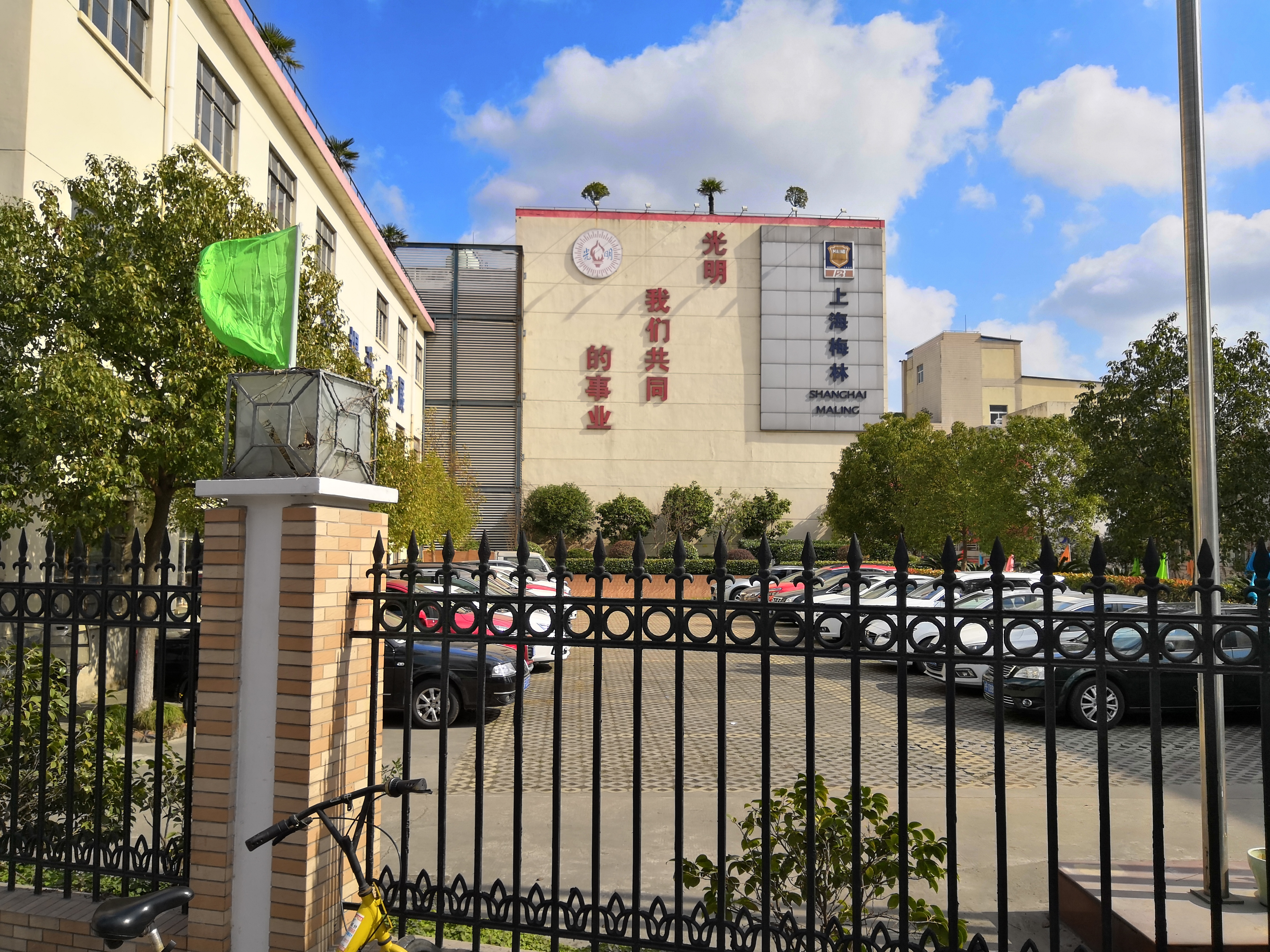 上海市杨浦区军工路，梅林食品公司